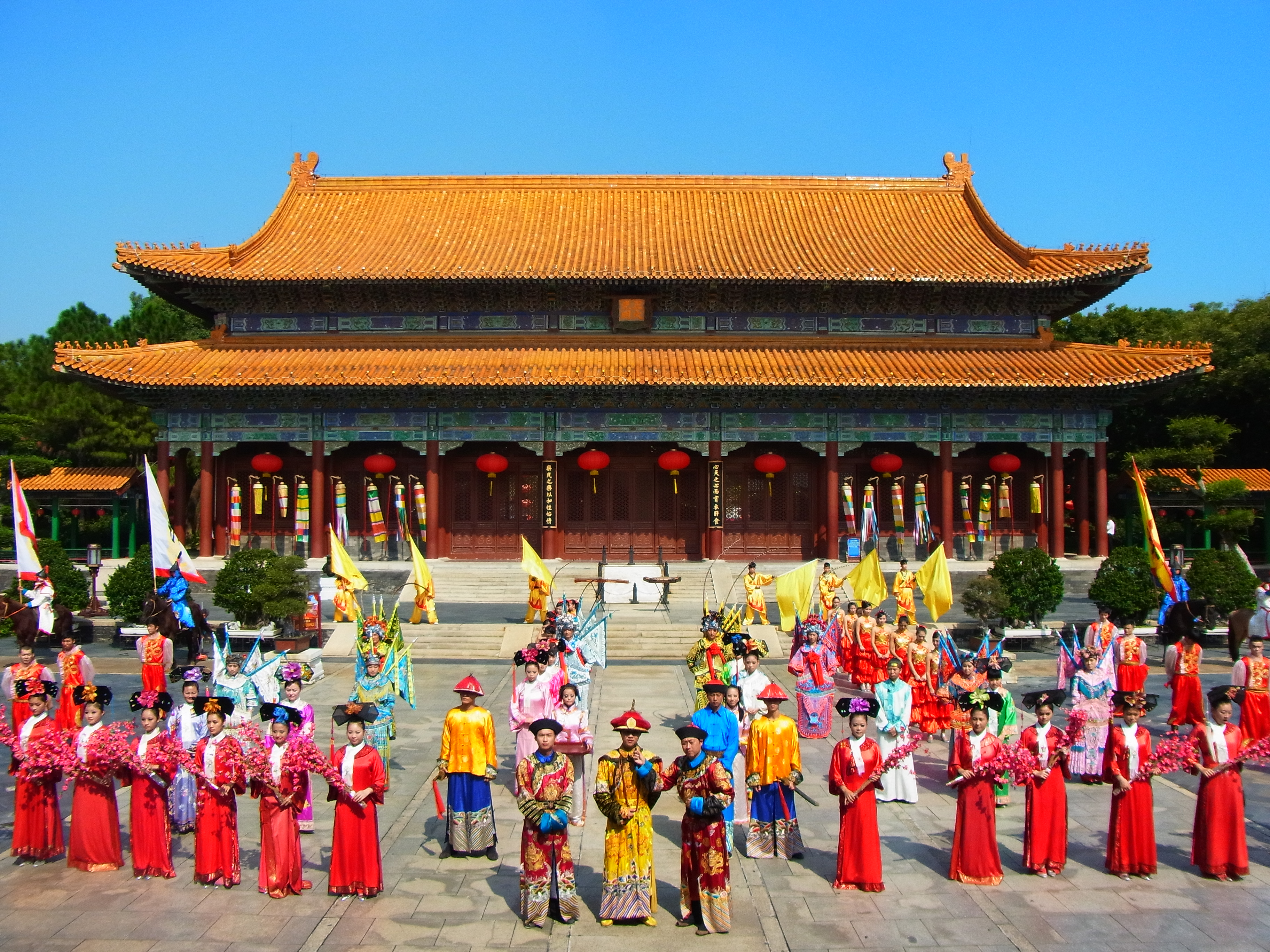 中文（香港）: 圓明新園大殿